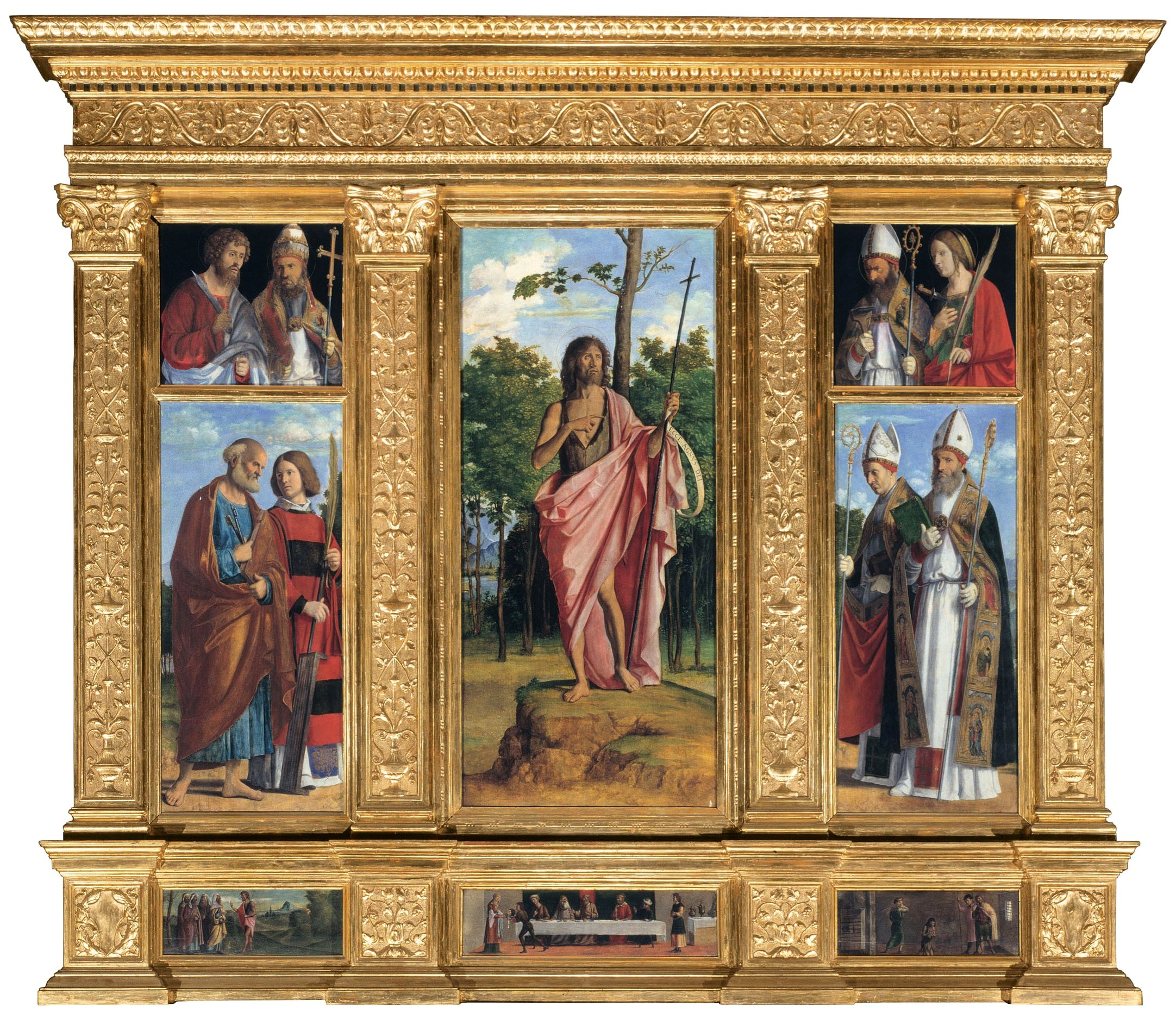 Soggetto: San Giovanni Battista e altri santi Artista: Giambattista Cima da Conegliano (1459-1517/8) Data: XVI secolo Luogo: Chiesa di San Giovanni Battista, San Fior